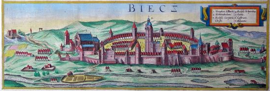 Biecz in XVII century